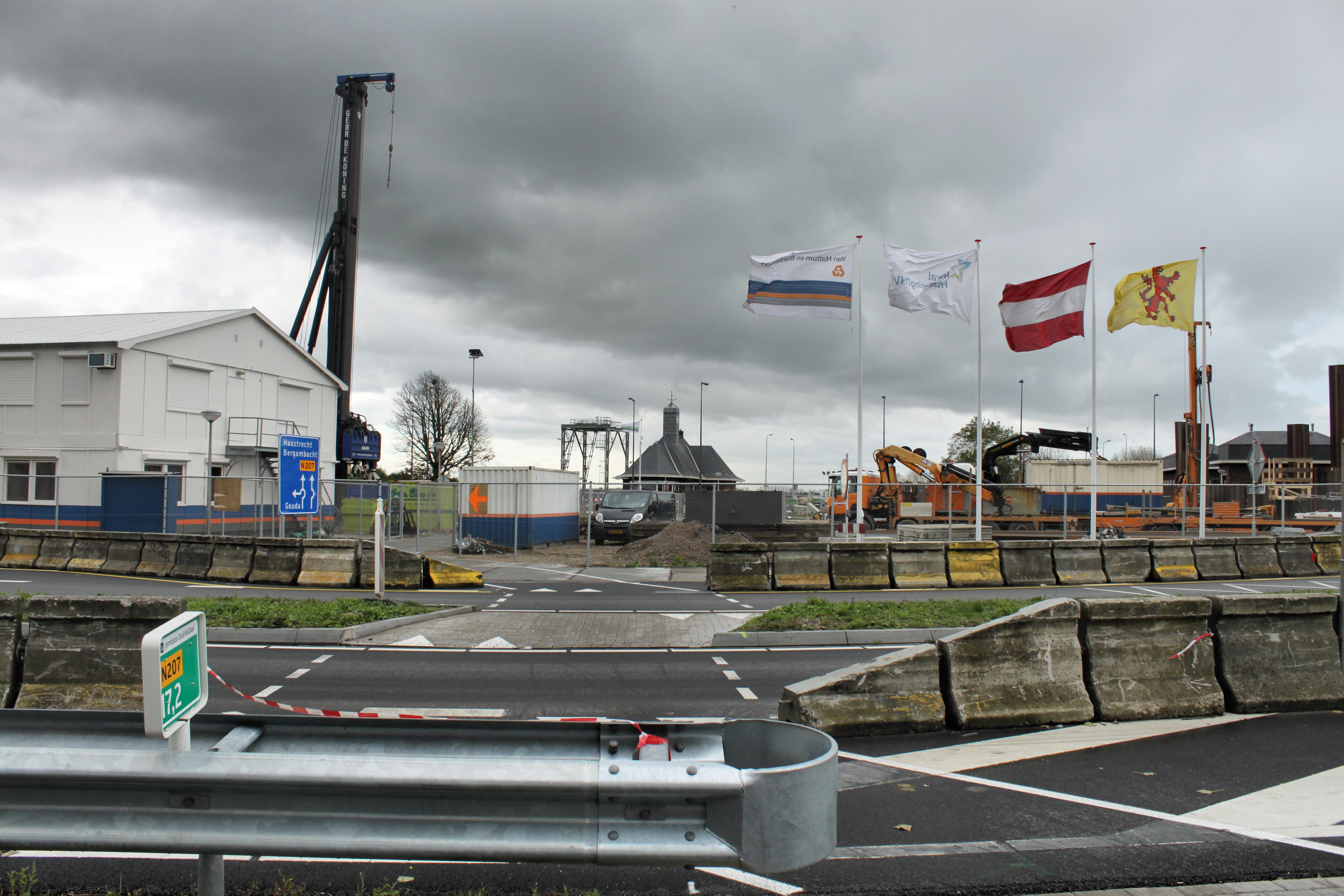 Aanleg van de tweede sluiskolk in de Julianasluis te Gouda